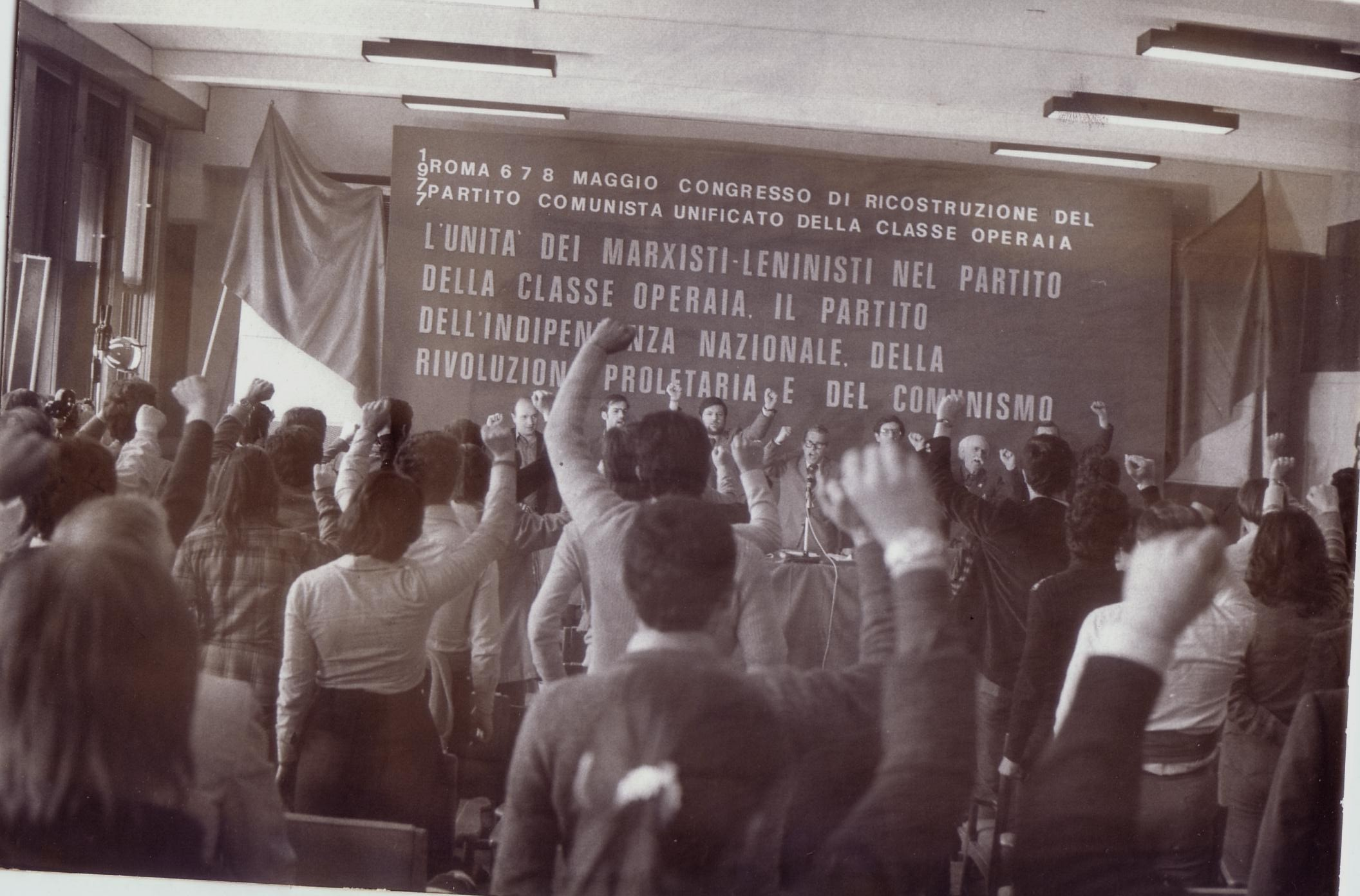 Congresso di ricostruzione del Partito Comunista Unificato d'Italia - Roma,6-7-8 Maggio 1977.